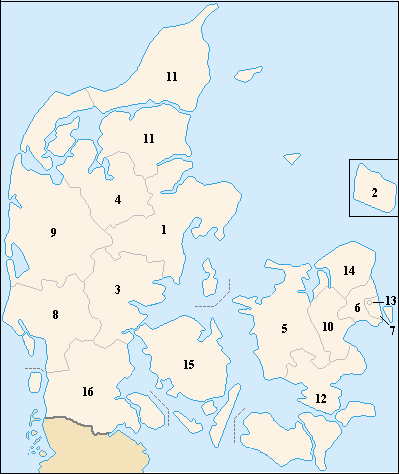 Любомир Таушанов, 2005 г.